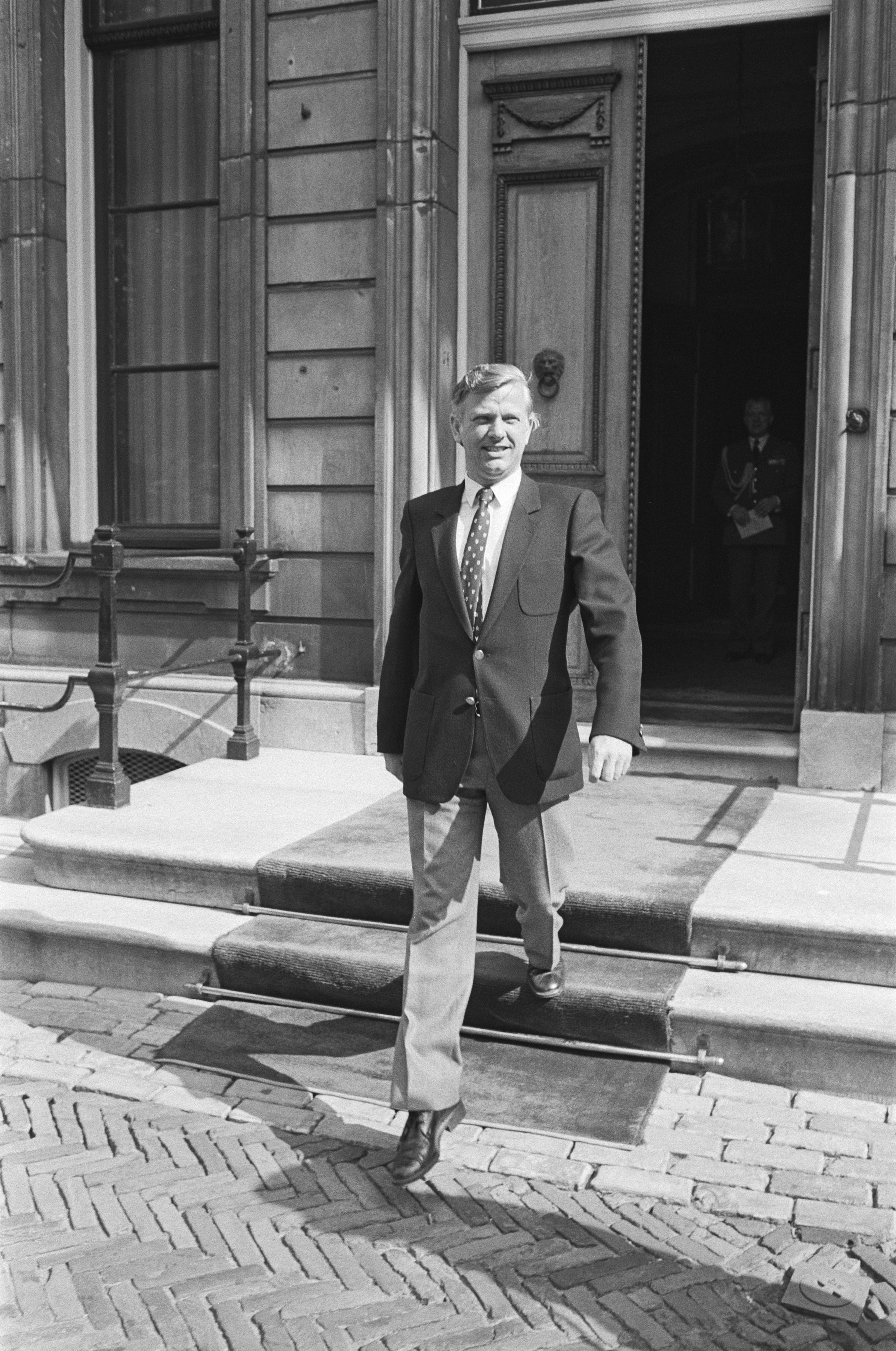 Collectie / Archief : Fotocollectie Anefo Reportage / Serie : Koningin Beatrix ontvangt de fractievoorzitters van de kleine partijen vanwege de kabinetsformatie Beschrijving : Fractievoorzitter Schutte (GPV) Datum : 10 september 1982 Locatie : Den Haag, Zuid-Holland Trefwoorden : kabinetsformaties, politiek, portretten Persoonsnaam : Schutte, Gert Fotograaf : Antonisse, Marcel / Anefo Auteursrechthebbende : Nationaal Archief Materiaalsoort : Negatief (zwart/wit) Nummer archiefinventaris : bekijk toegang 2.24.01.05 Bestanddeelnummer : 932-3204